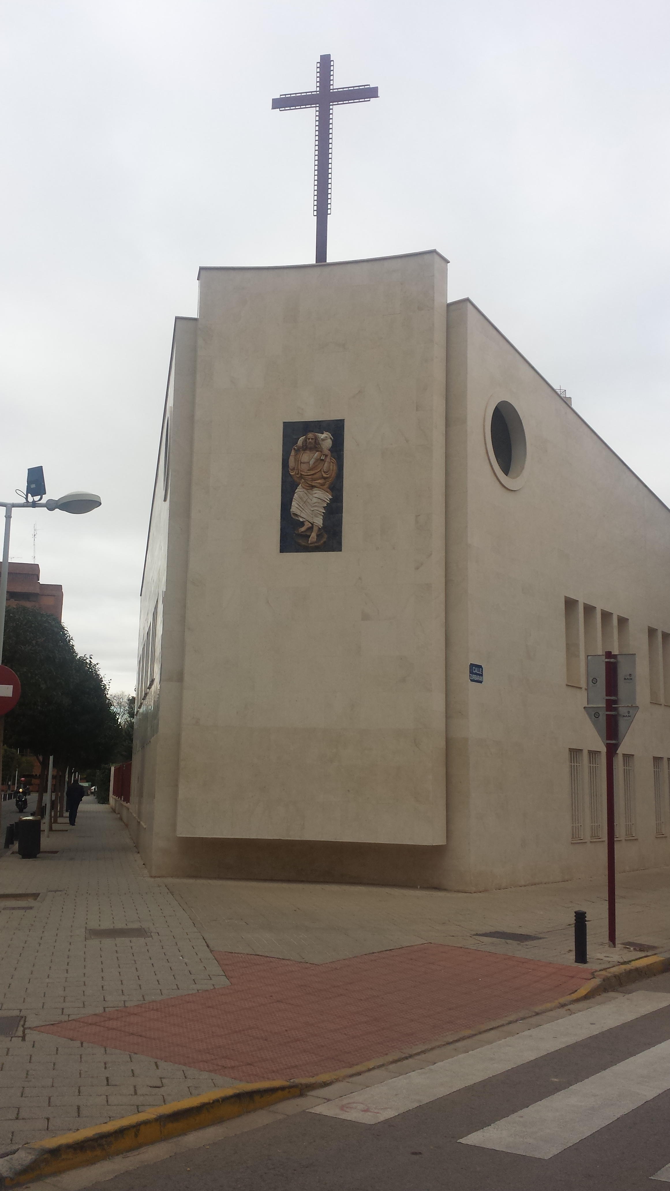 Iglesia de El Buen Pastor